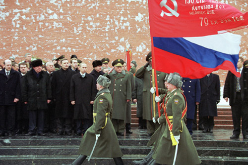 МОСКВА. Церемония возложения венка к Могиле Неизвестного солдата у Кремлевской стены.